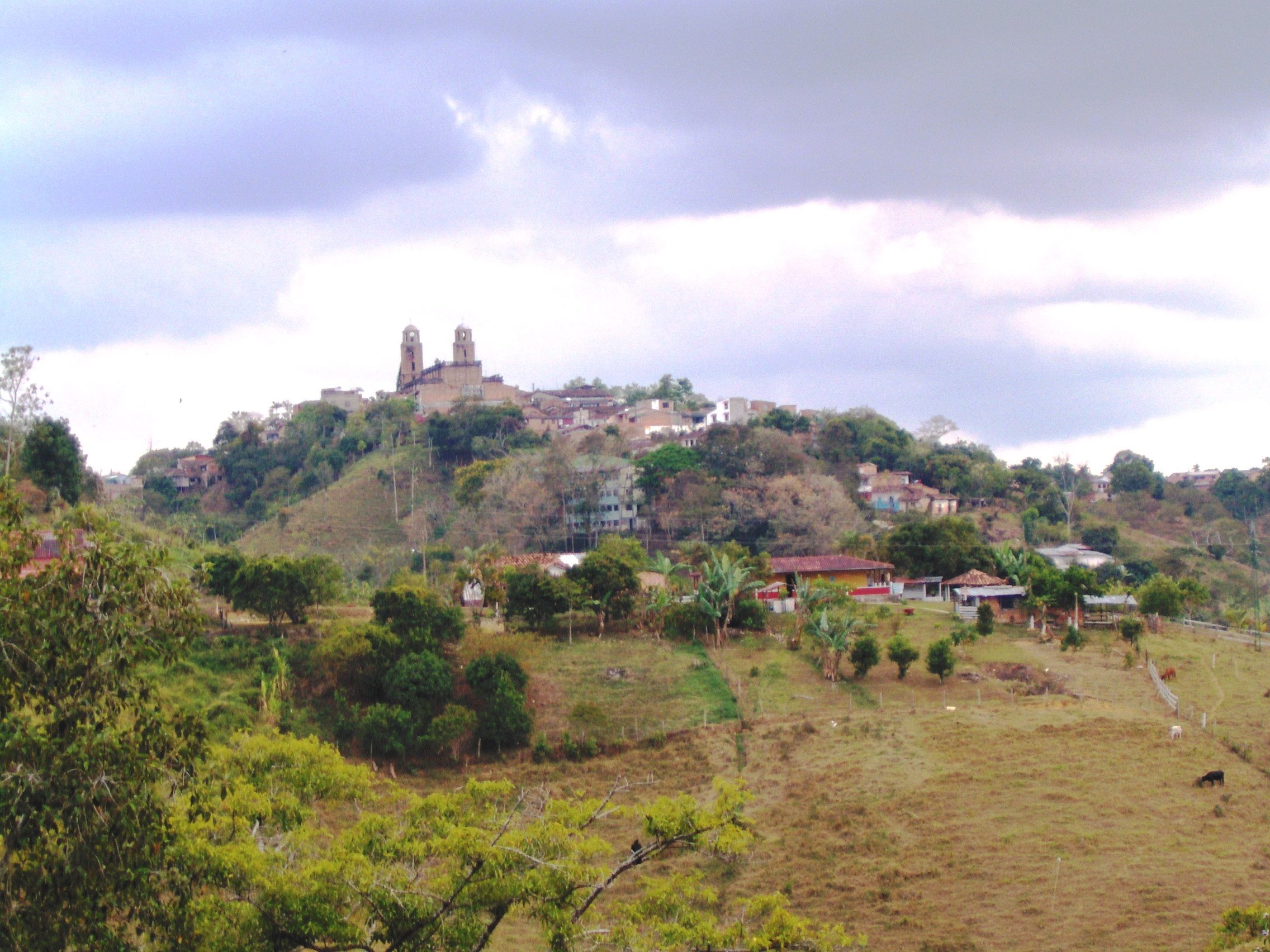 Municipio de Yali, Antioquia